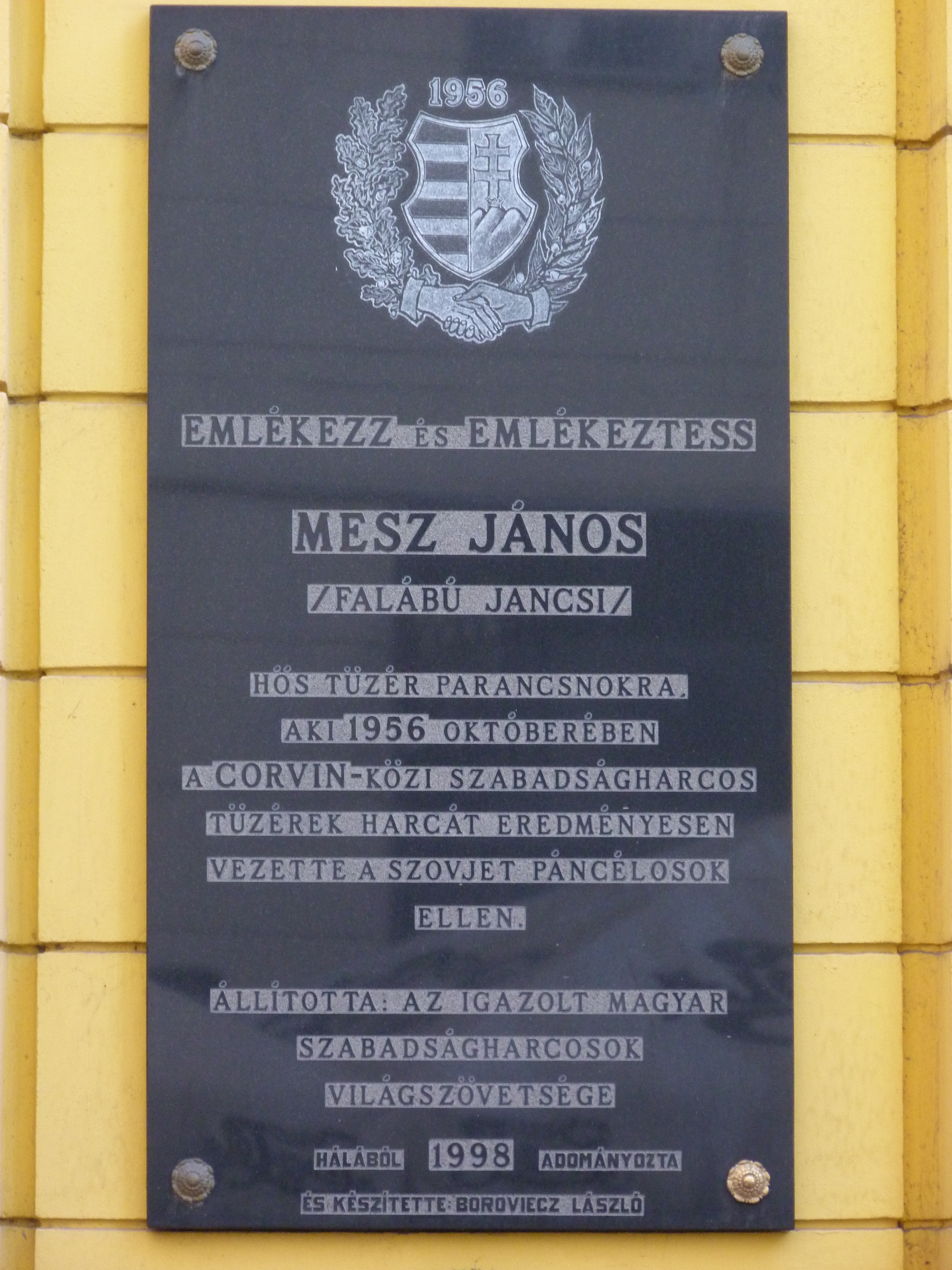 A felvétel 2012. december 5 -én készült Budapesten, a Józsefvárosban. Corvin köz. ©© Published under Creative Commons in the Metapolisz DVD line. All of the photos and vids in the Metapolisz DVD line are under Creative Commons and can be used even for commercial – for profit – purposes. Recommended Citation Derzsi Elekes Andor: Metapolisz DVD line ©© Megjelent Creative Commons alatt a Metapolisz sorozatban. A Metapolisz sorozat valamennyi képe és filmje Creative Commons alatti valamint kereskedelmi - for profit - célra is felhasználható. Ajánlott hivatkozás: Derzsi Elekes Andor: Metapolisz DVD line . Ugyanerről a tábláról másik fénykép: File:Budapest-corvin-mesz.jpg